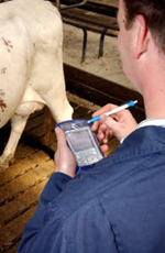 Bedrijfsinspectie door de inspecteur: instrument voor rundveeverbetering